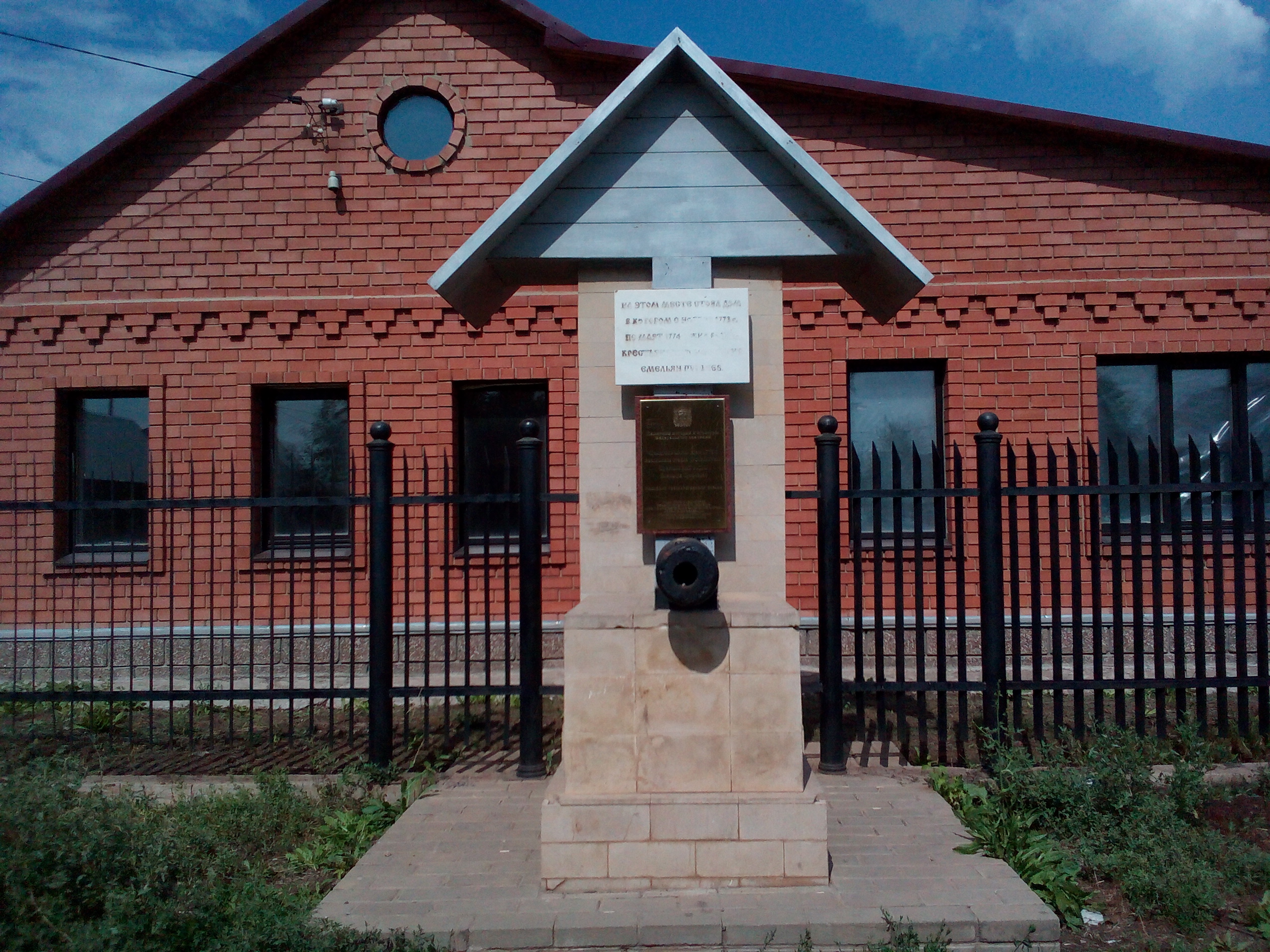 Памятное место, где в 1773 году находилась ставка руководителя крестьянской войны Емельяна Пугачева: улица Бердинская / улица Восстания, 30, Оренбург, Оренбургская область